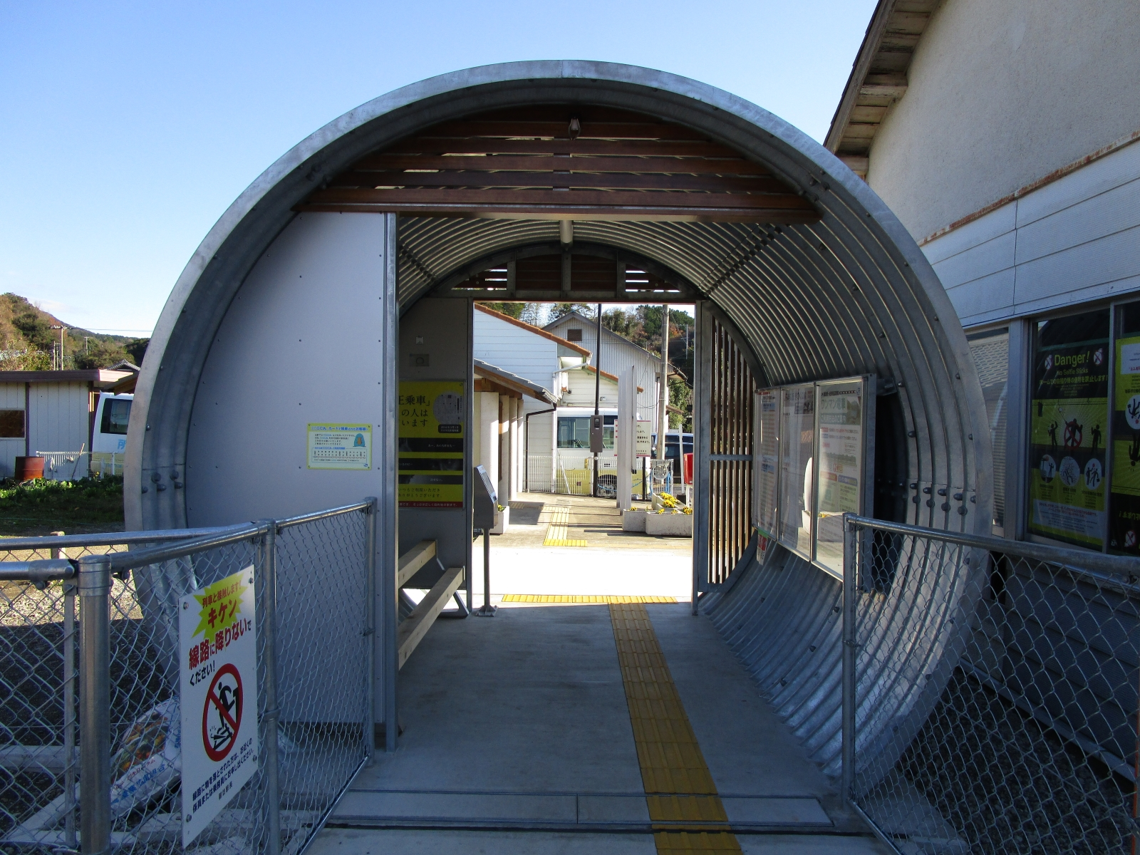 和佐駅駅舎裏側